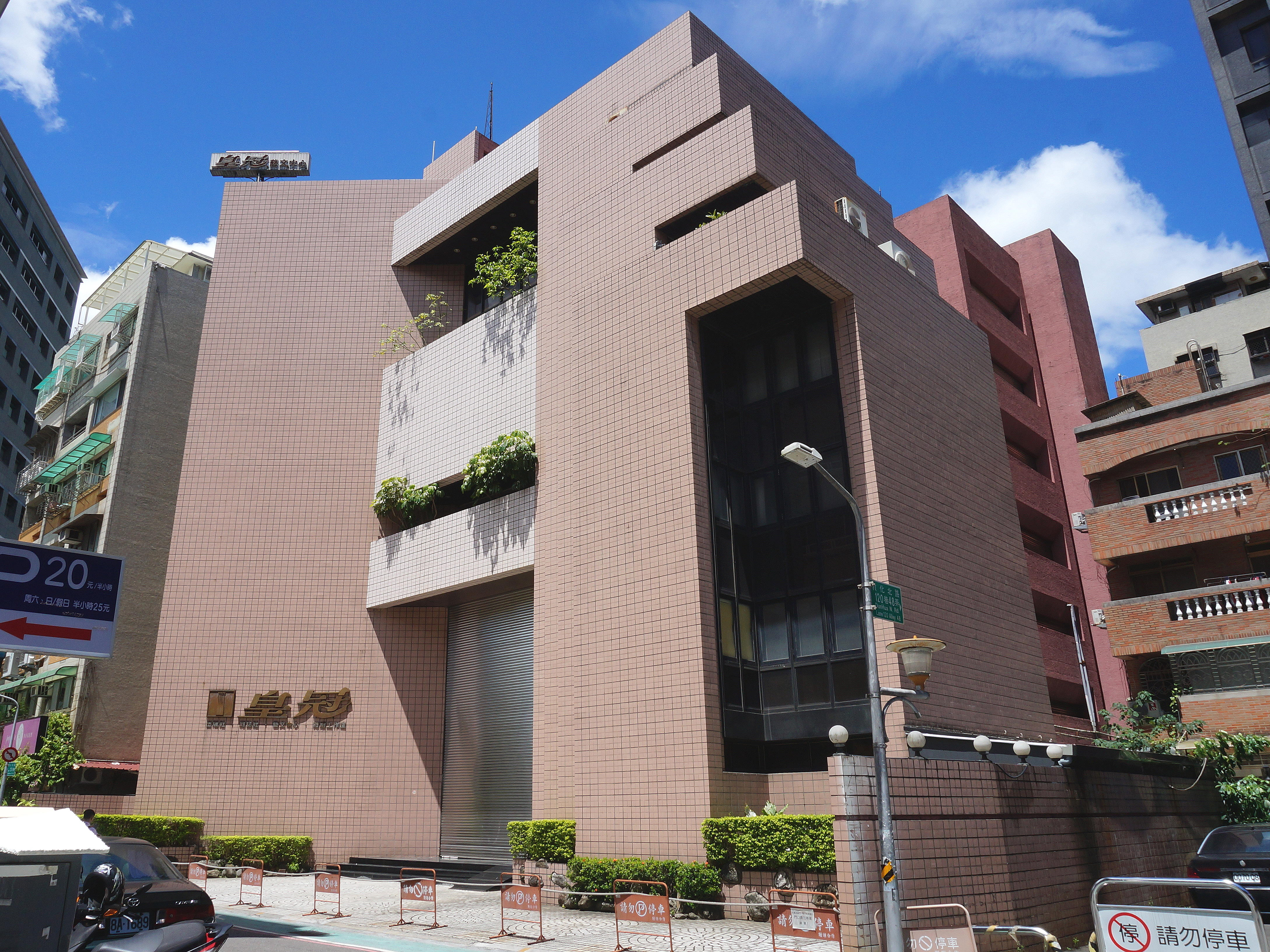 皇冠文化集團總部，地址：臺北市松山區敦化北路120巷50號。